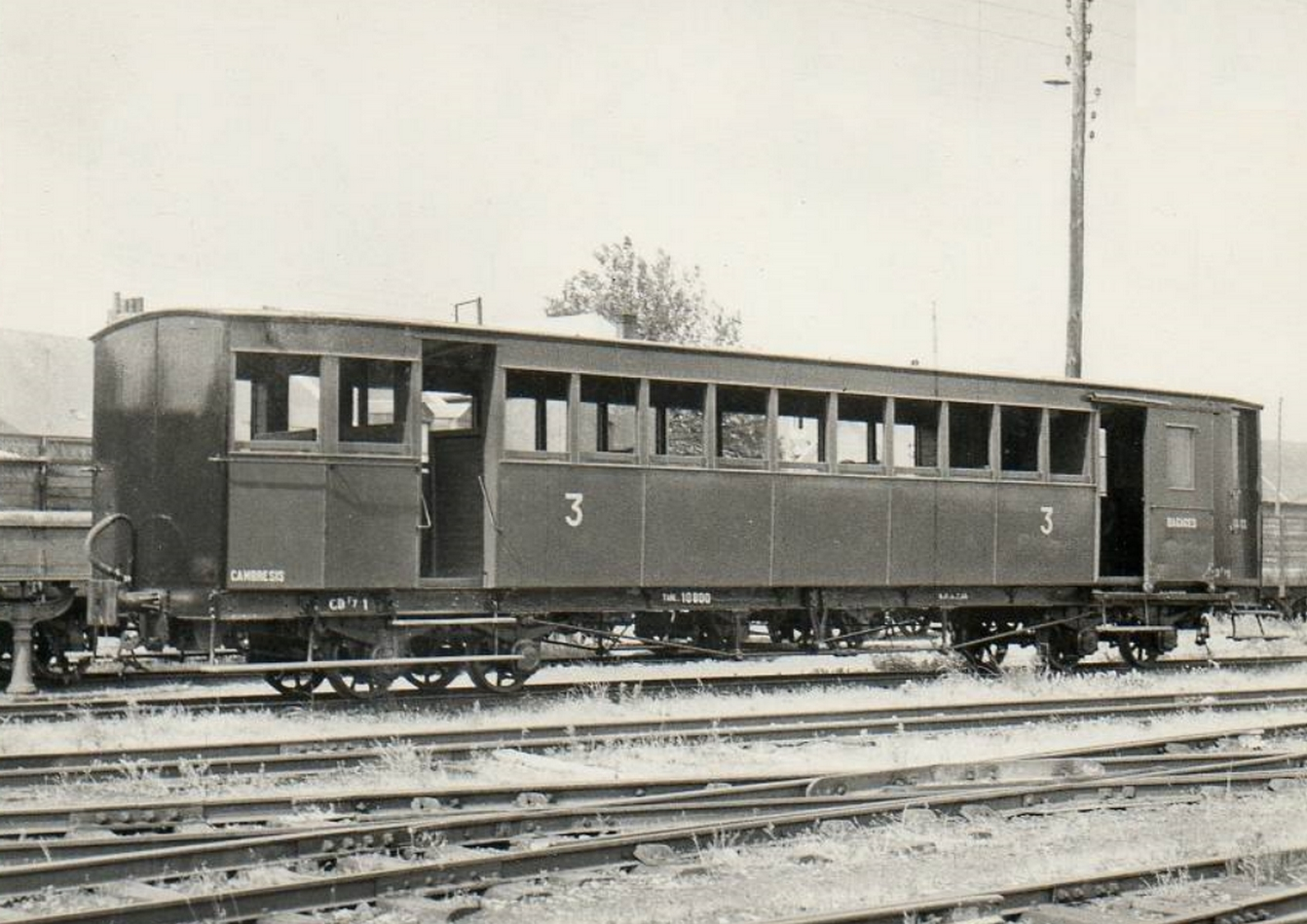 Wagon-voyageurs des Chemins de fer du Cambrésis à Caudry, Nord, Nord-Pas-de-Calais, France.